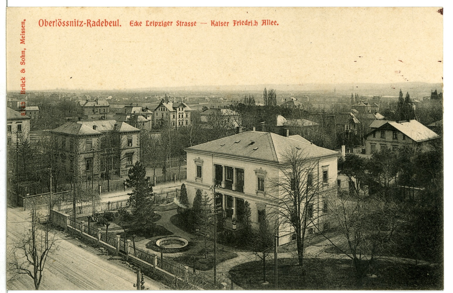 Radebeul; Ecke Leipziger Straße - Kaiser Friedrich Allee This postcard is from publisher Brück & Sohn in Meißen ( postcard has a unique number 08743 and is available in a higher resolution at the publisher. This images was uploaded in a cooperation project between Wikipedians and the publisher.